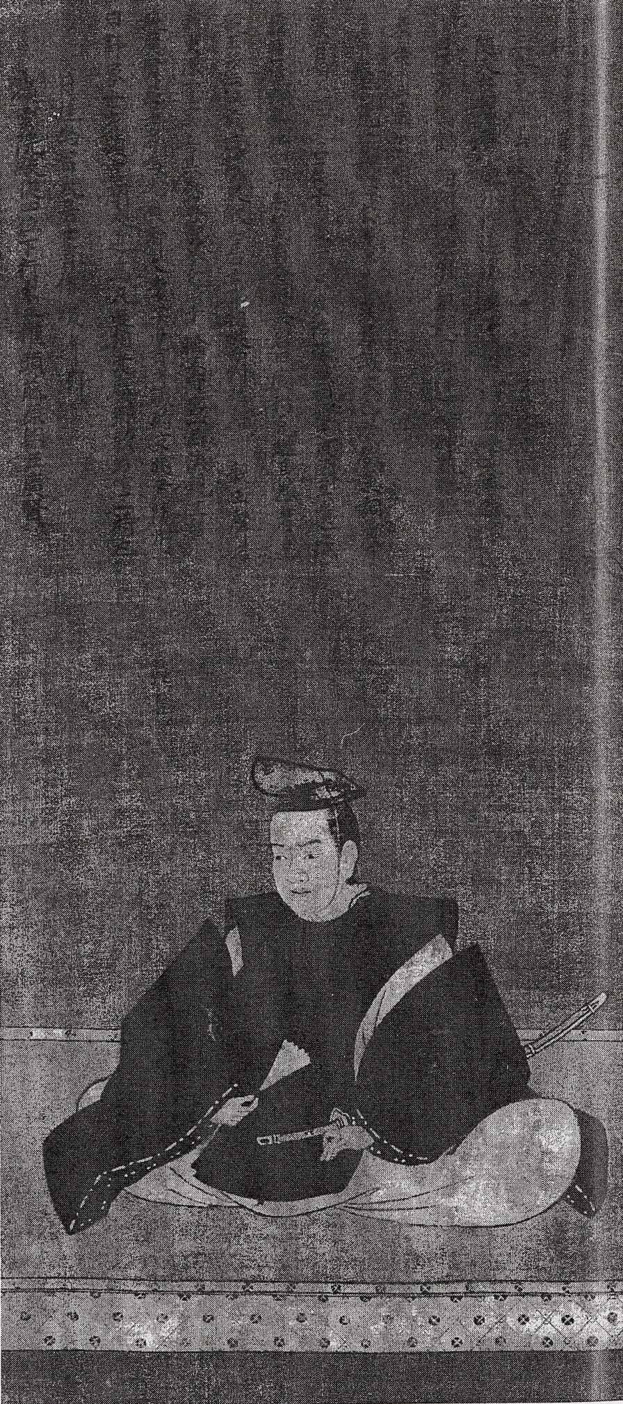 高家旗本六角氏初代当主・六角広賢の肖像画。